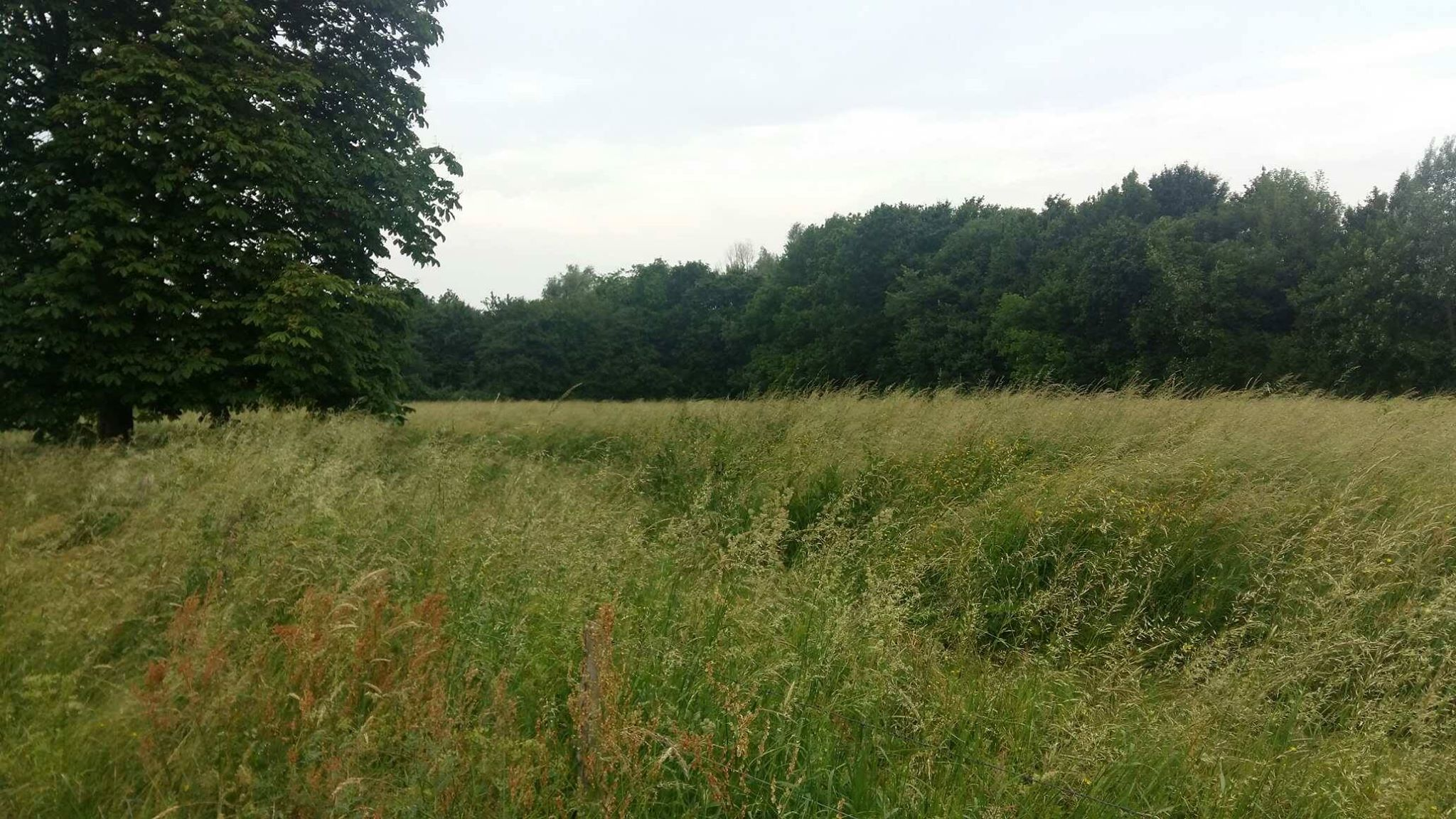 Grassland en bosrand in Vikinghof